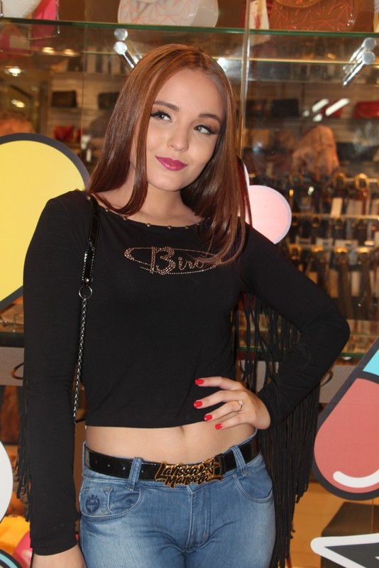 A atriz e cantora Larissa Manoela em abril de 2016